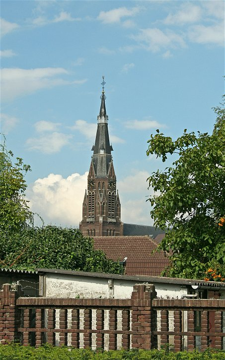 In de wijk Hemelrijken, Eindhoven (Oud-Woensel)